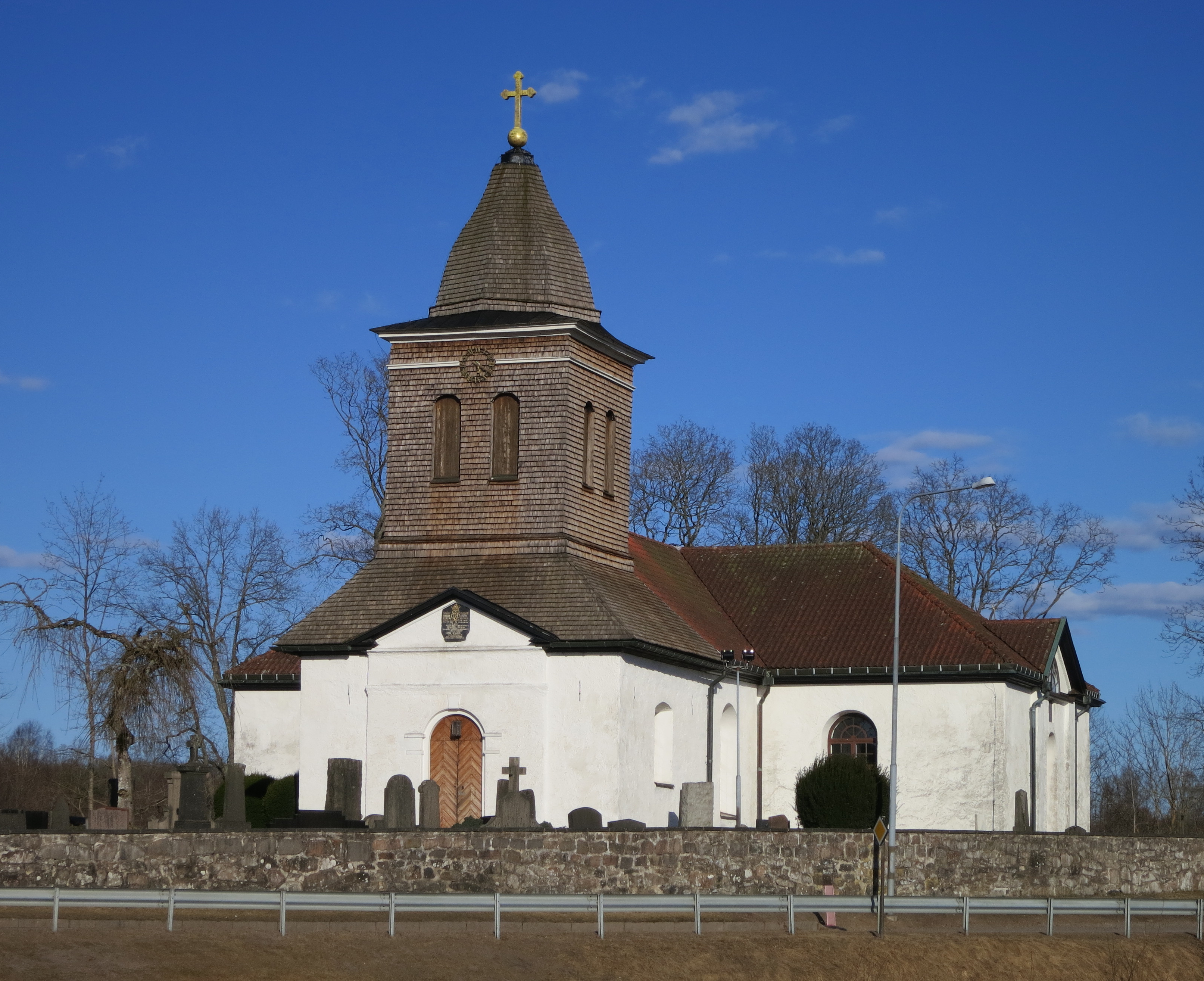 Örkelljunga kyrka